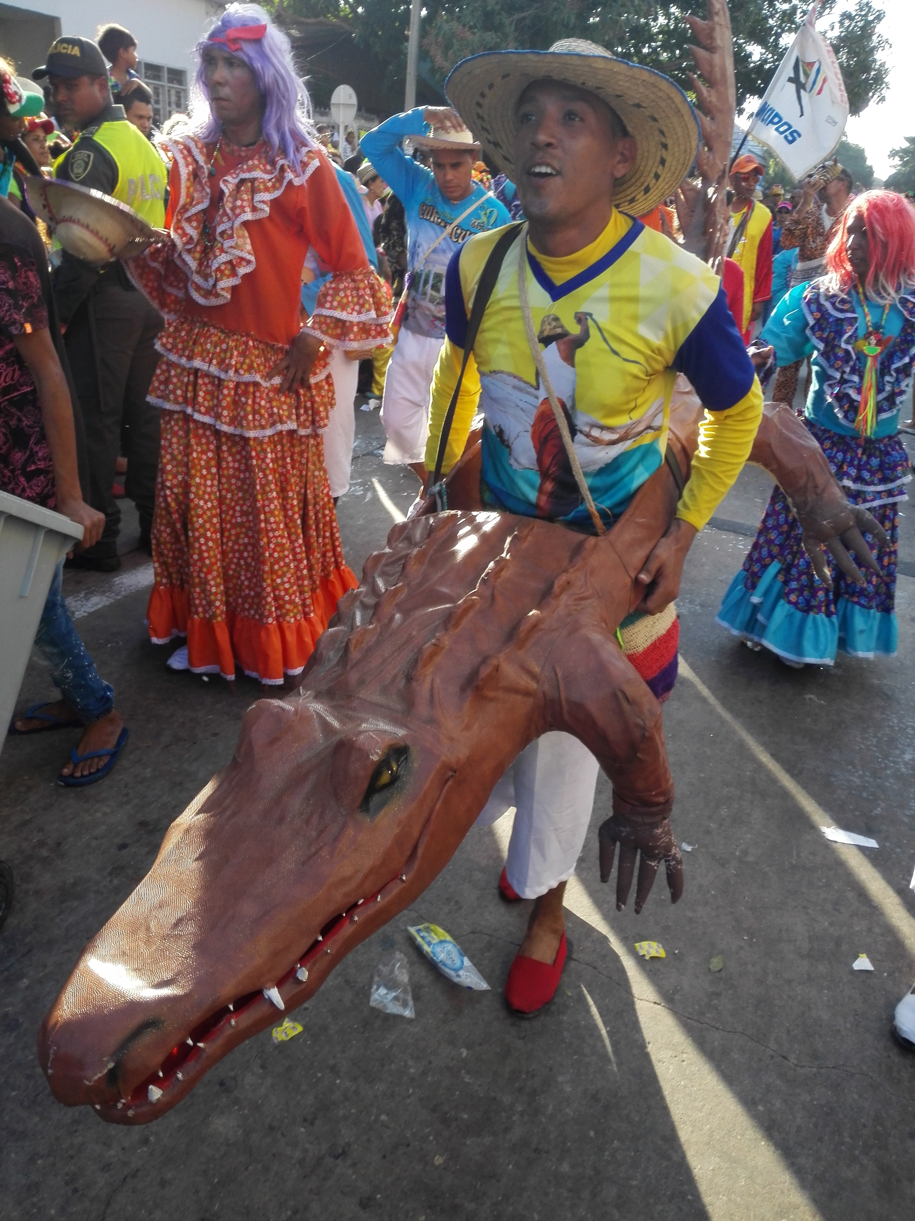 Danza del Caimán Cienaguero en el Carnaval de Barranquilla.